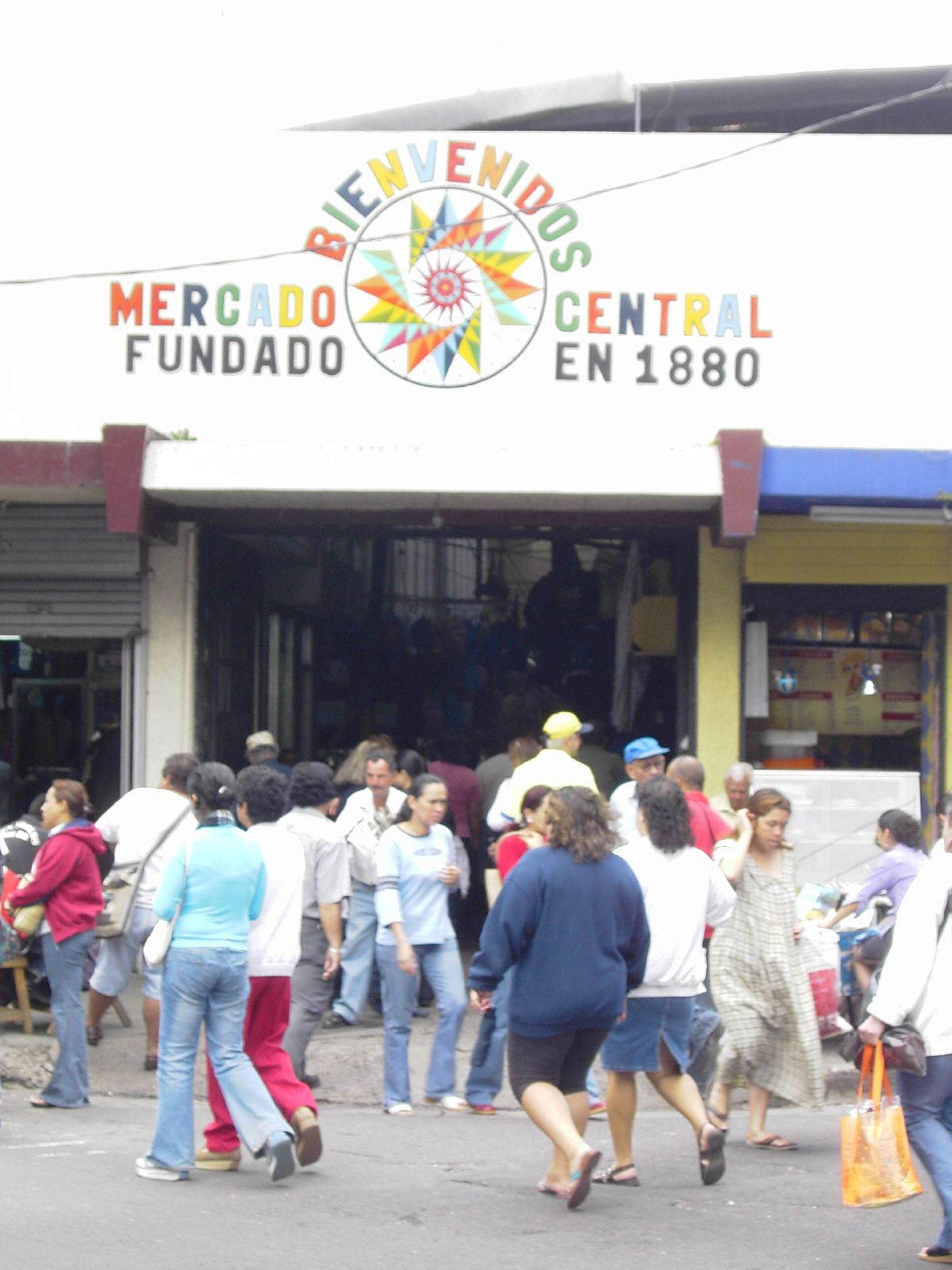 San José Central Market, San Jose, Costa Rica